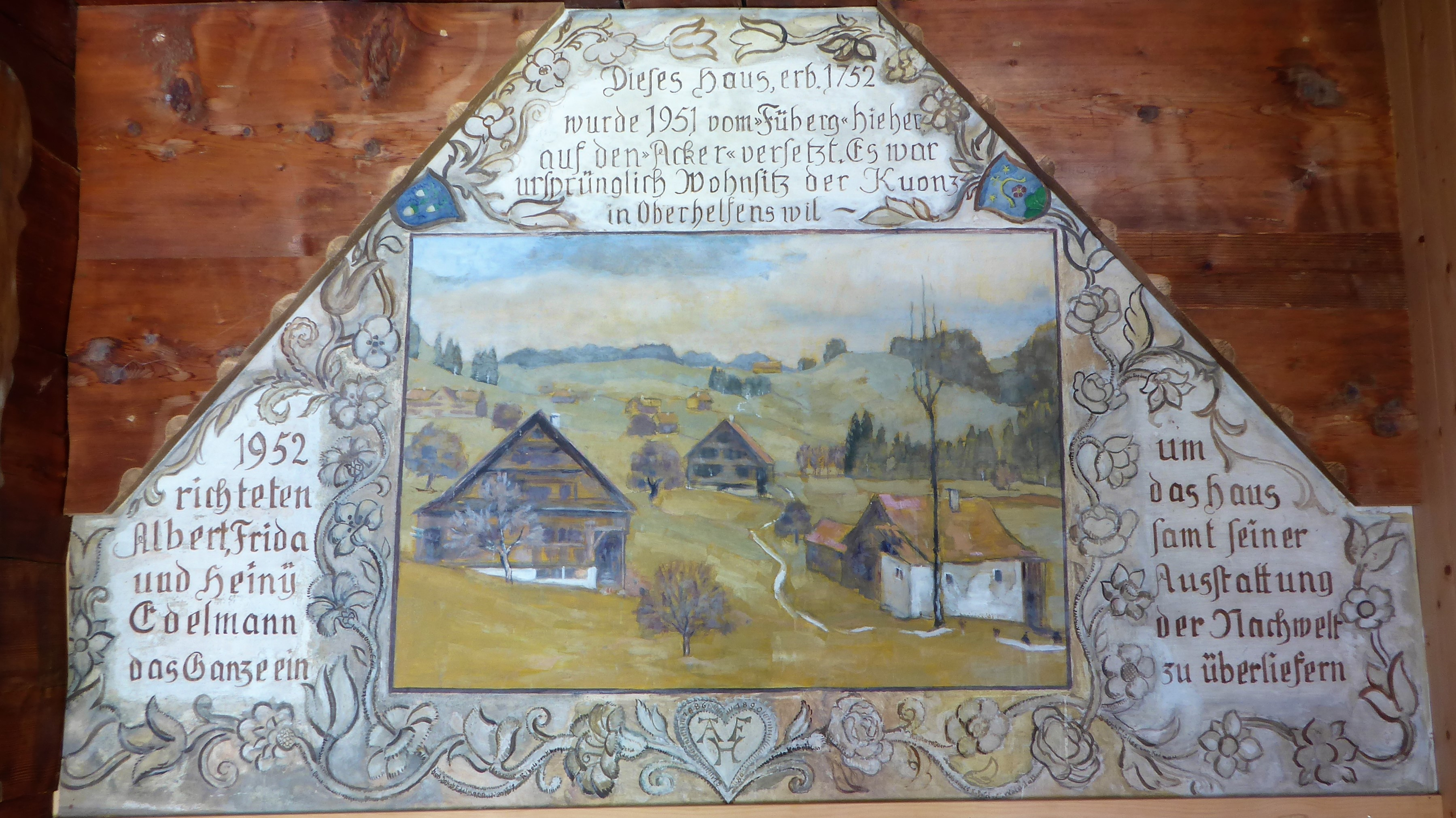 Die Wandverzierung beim Hauseingang zeigt das Ackerhus Ebnat-Kappel an seinem früheren Standort im Füberg bei Oberhelfenschwil